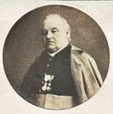 Balthasar von Daller, kath. Priester und bayerischer Landtagsabgeordneter (1835-1911), Ritter des Verdienstordens der Bayerischen Krone